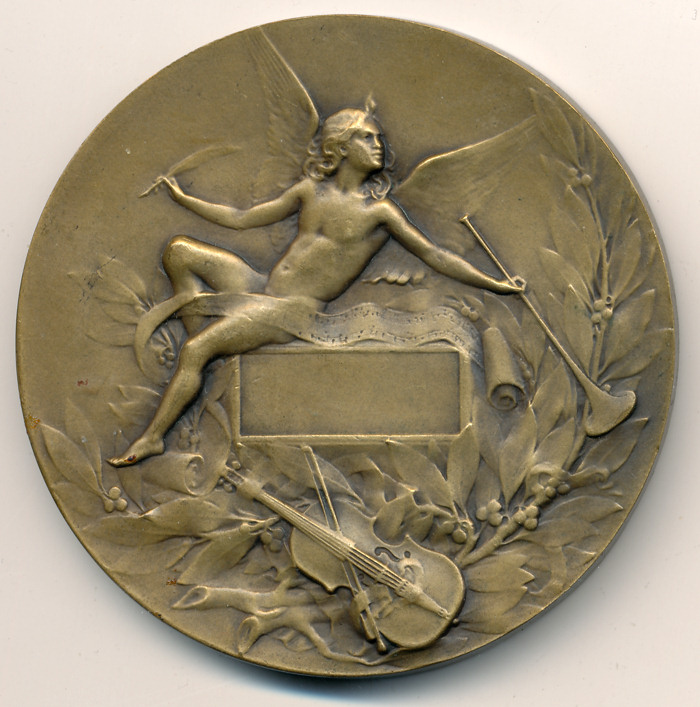 Orphée endort Cerbère aux sons de sa lyre par Lucien Coudray, oeuvre avec laquelle il obtient le Grand Prix de Rome en 1893,bronze, 68mm - revers